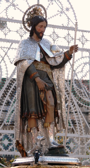 Foto Personale Festa di S. Rocco - CASAMASSIMA (BA) GFDL